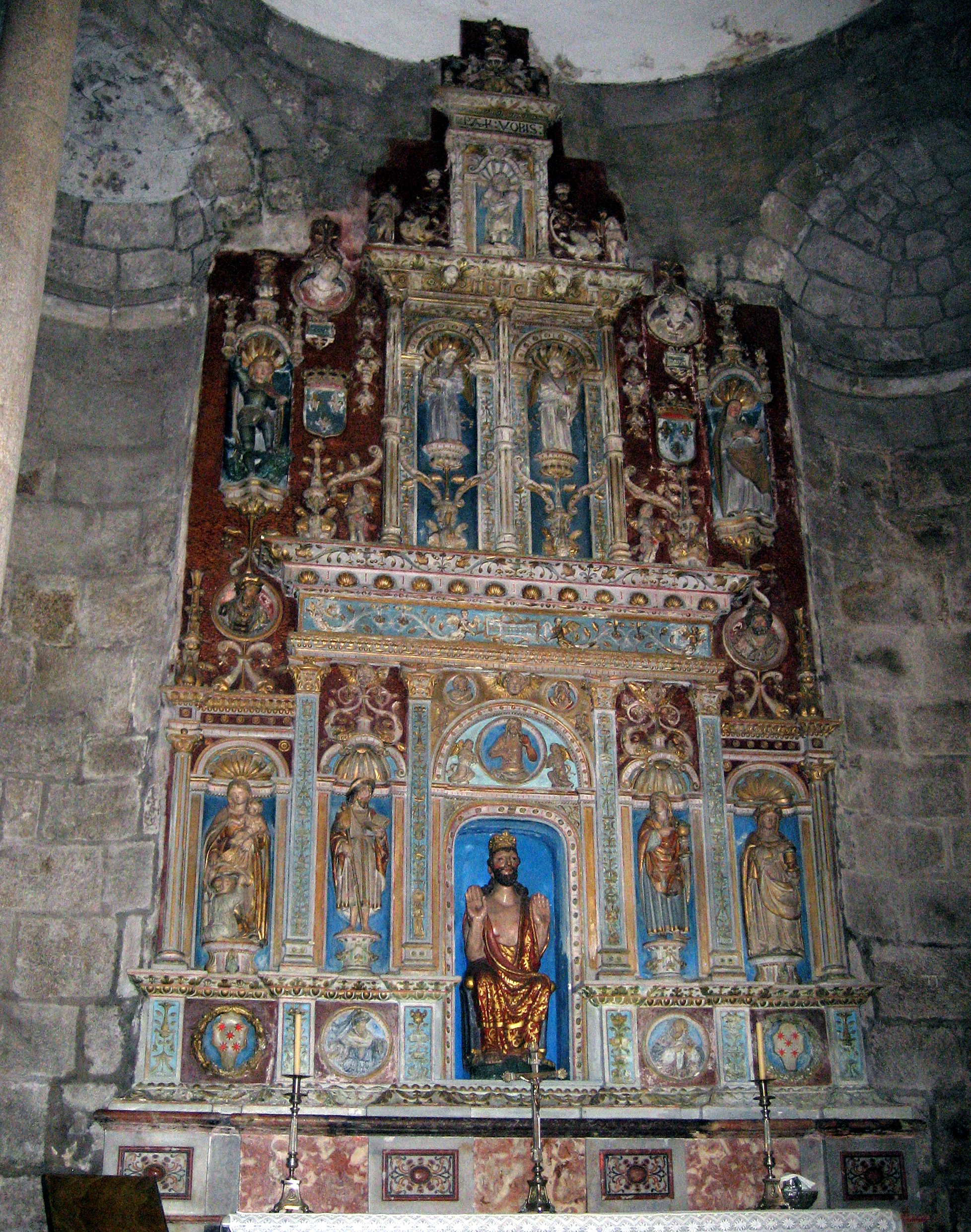 Retablo del siglo XVI de la capilla del Salvador en la catedral de Santiago de Compostela.